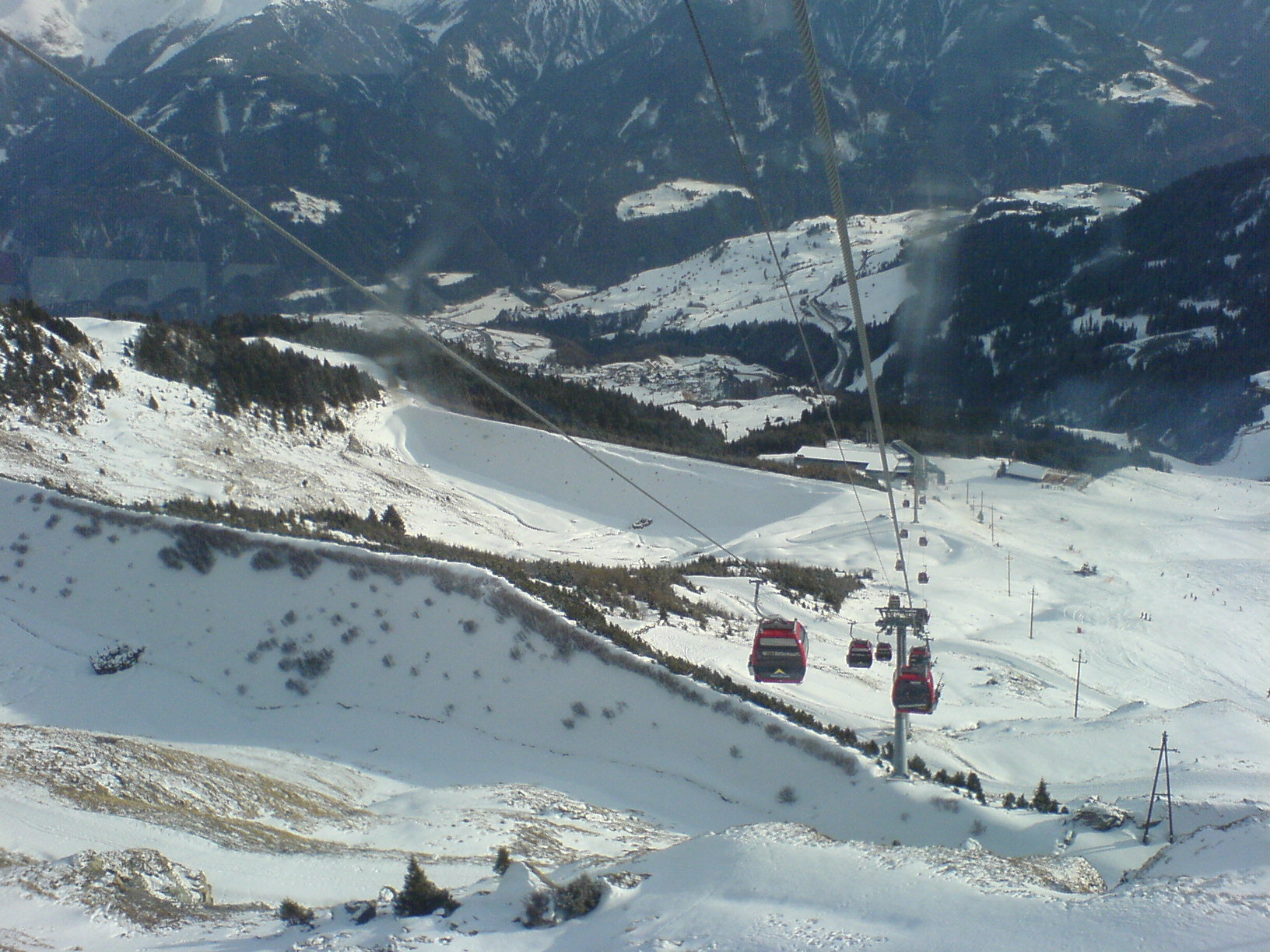 Schönjochbahn von innerhalb einer Gondel